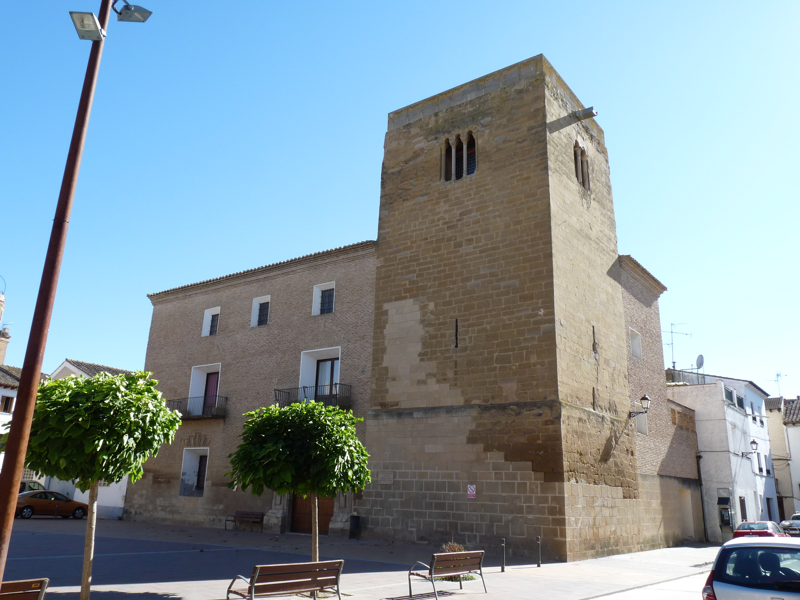 Albalate de Cinca - Palacio ducal de Solferino (s. XVII) - Vista general